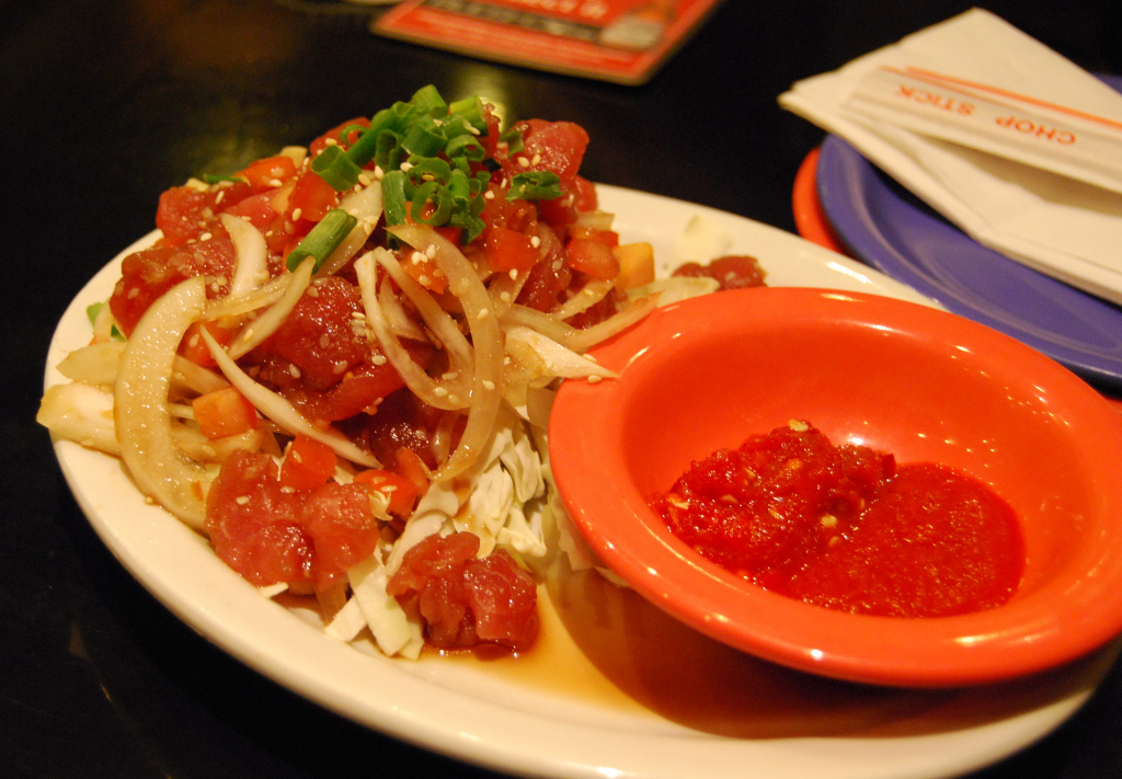 ahi poke (poh-kay)